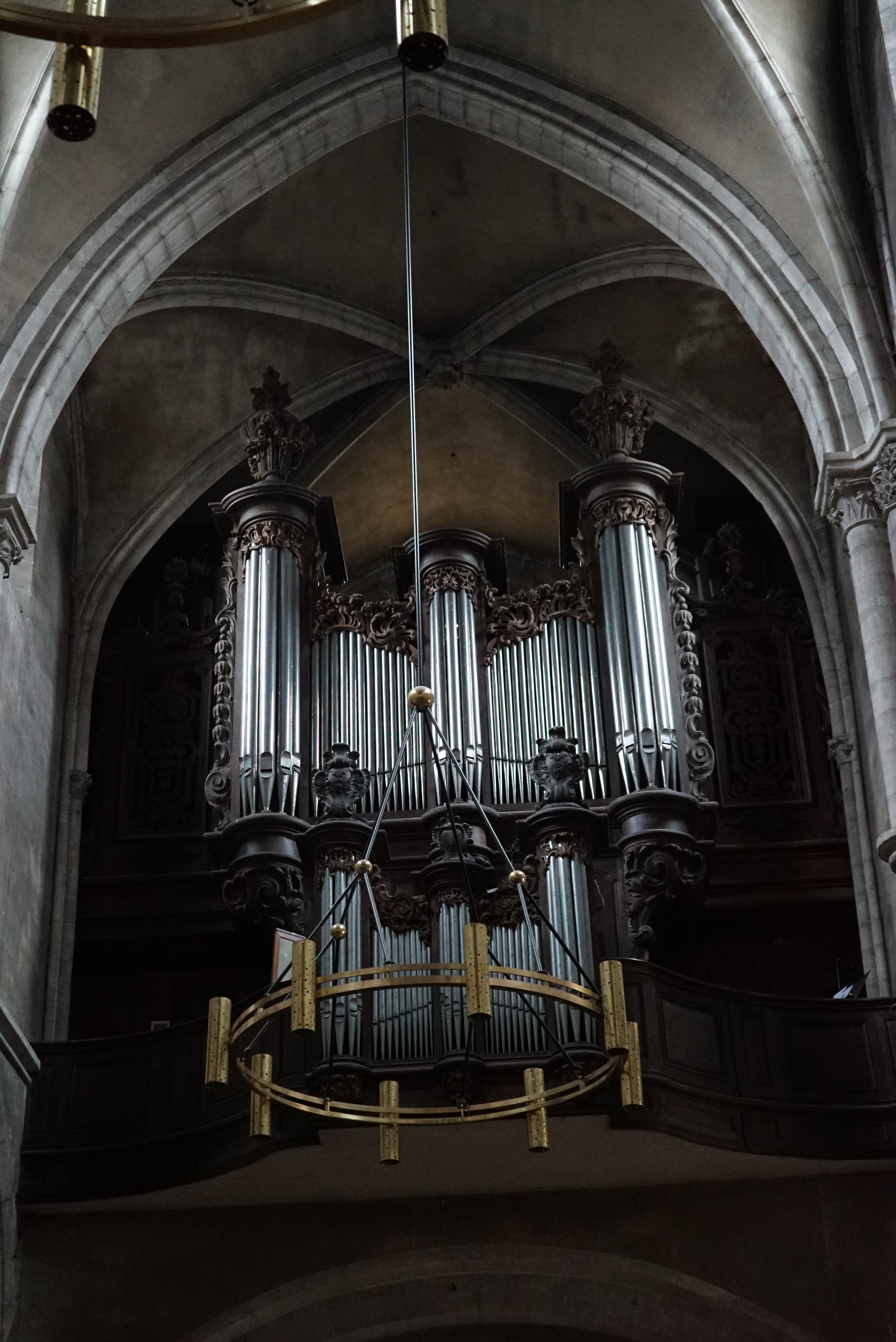 de la basilique de Chaumont.